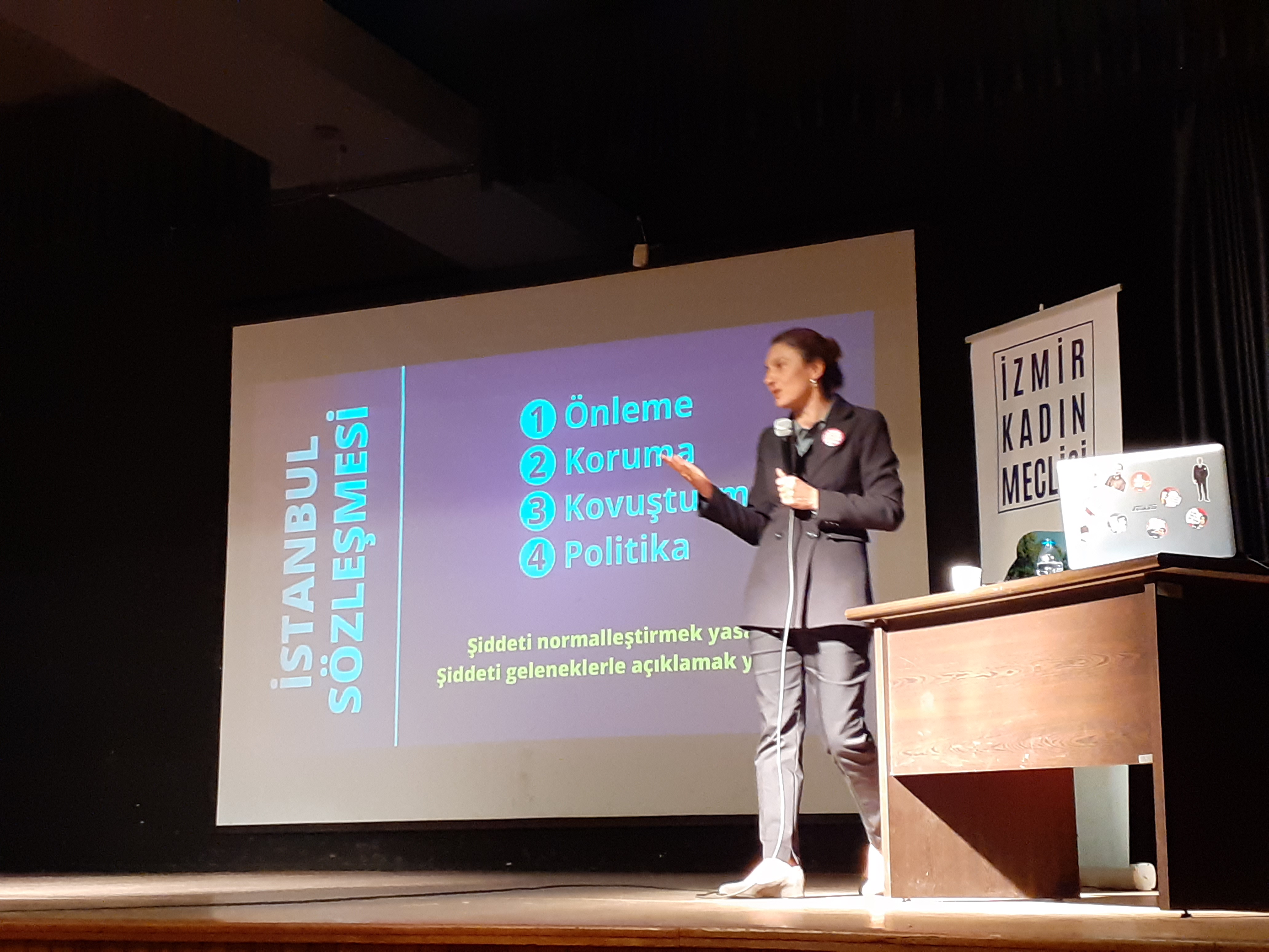 Kadın Cinayetlerini Durduracağız Platformu Genel Temsılcisi Gülsüm Kav İzmir Kadın Meclisi'nin Gençlik Tiyatrosu binasında düzenlediği konuşmada İstanbul Sözleşmesi'nden bahsederken.